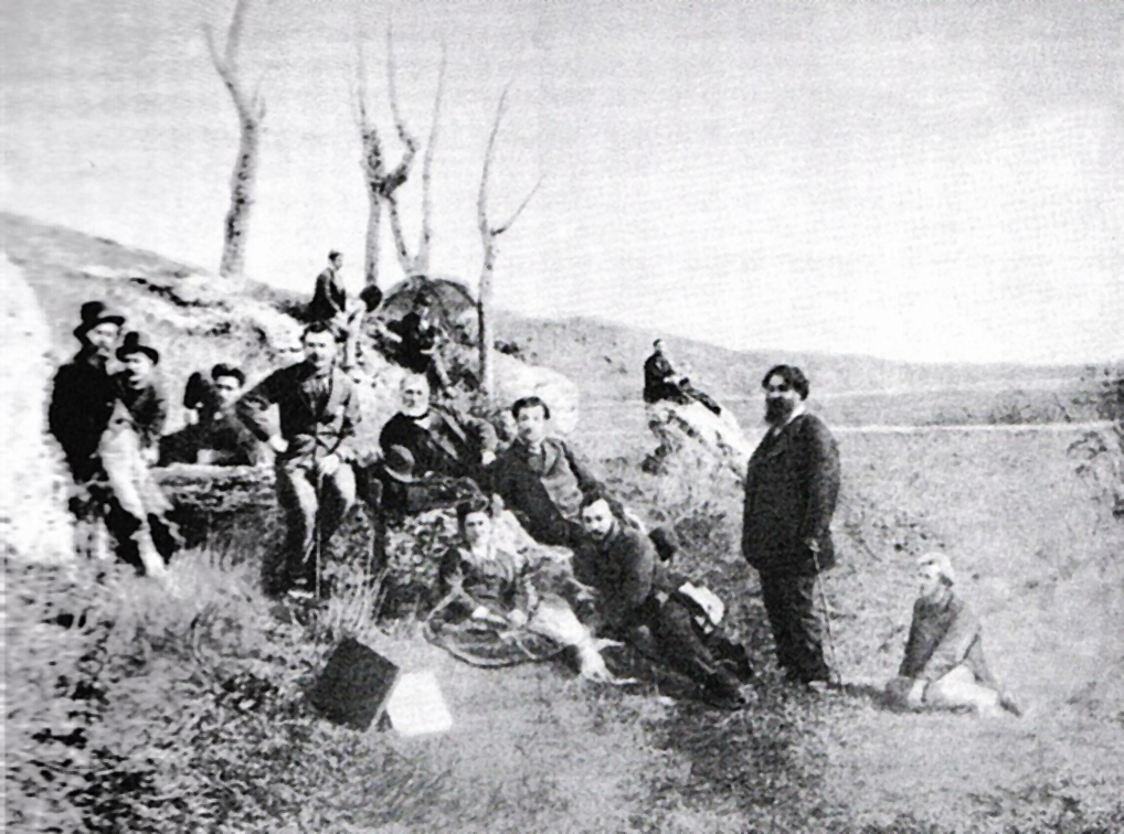 Printre pictorii de la Barbizon (fotografie de epoca)